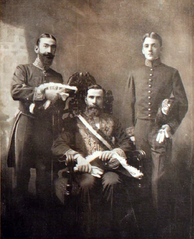 Legación de Chile en Washington. Excmo. señor Aníbal Cruz Díaz y sus secretarios.